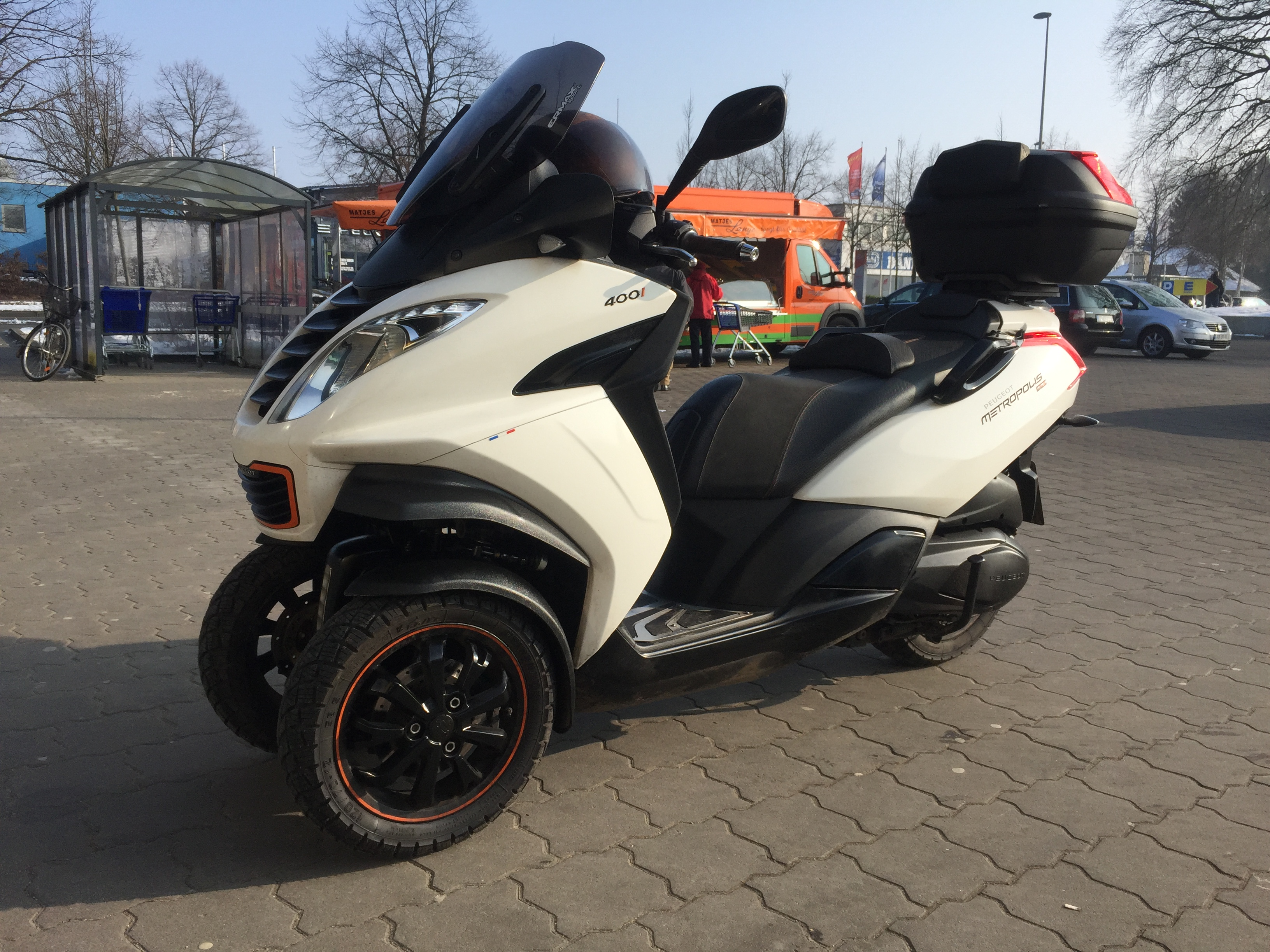 Peugeot Metropolis 400i